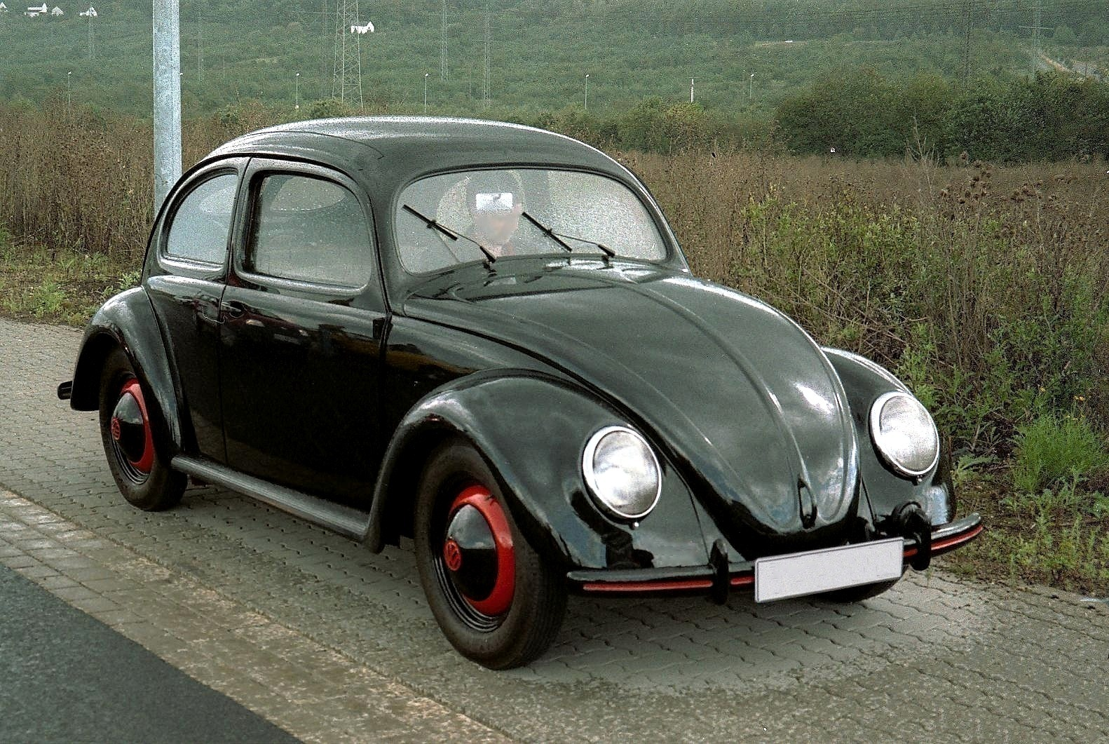 VW Standard (1950)